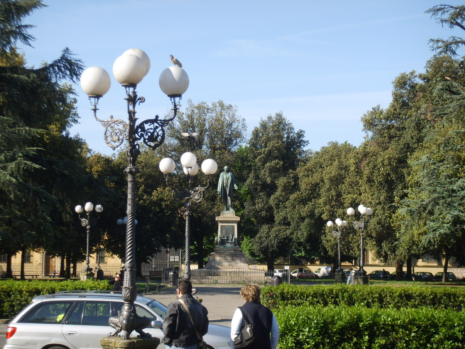 Piazza dell'inipendenza